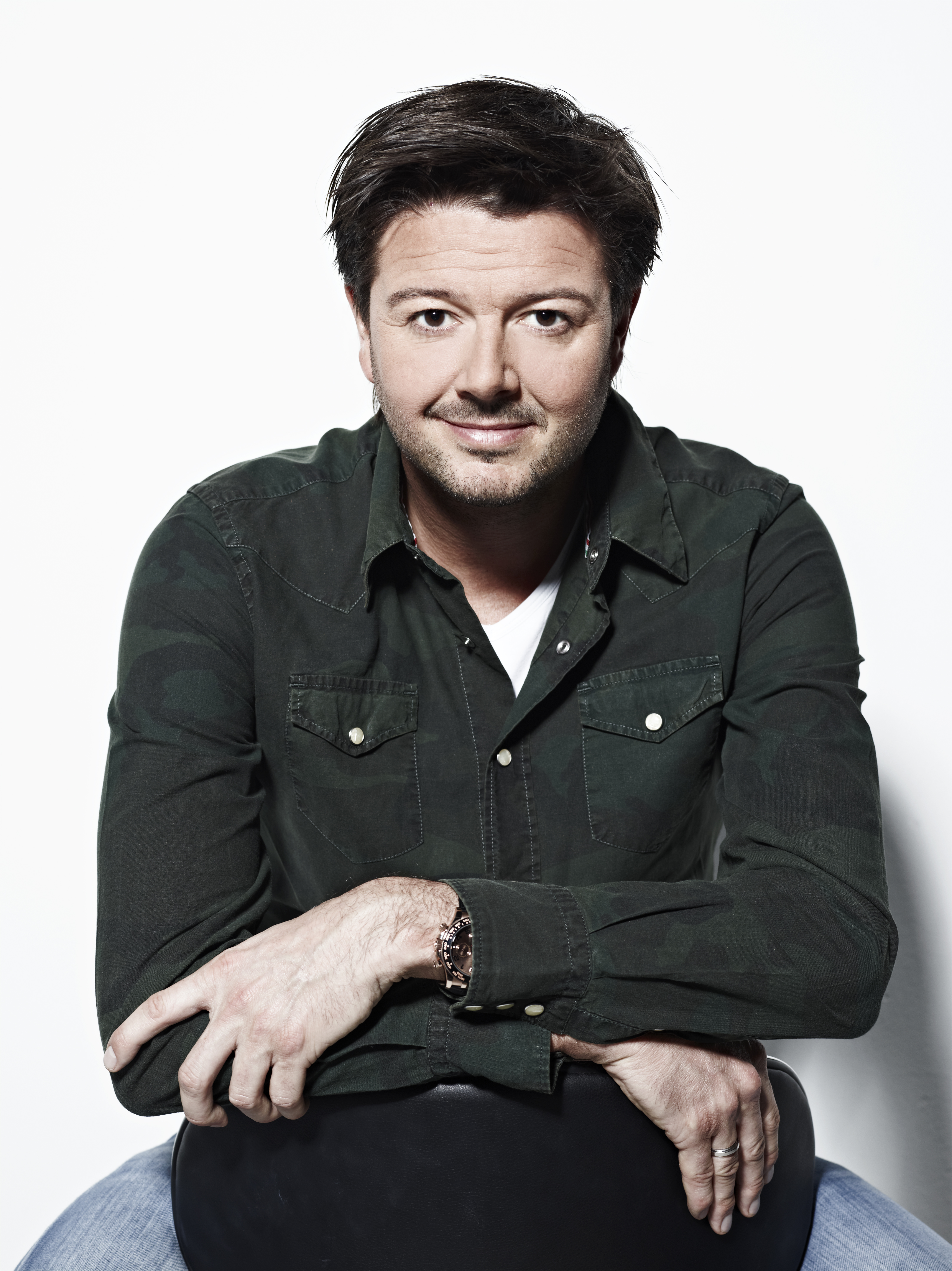 persfoto 2012